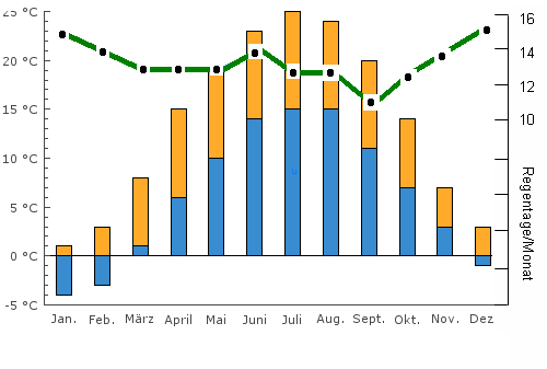 Ein Klimadiagramm von Puchberg am Schneeberg. Es zeigt die Höchst- und Tiefsttemperatur pro Monat im Durchschnitt (blau und rot). Auch zu sehen sind die regentag pro monat die mit der grünen Linie dargestellt werden.